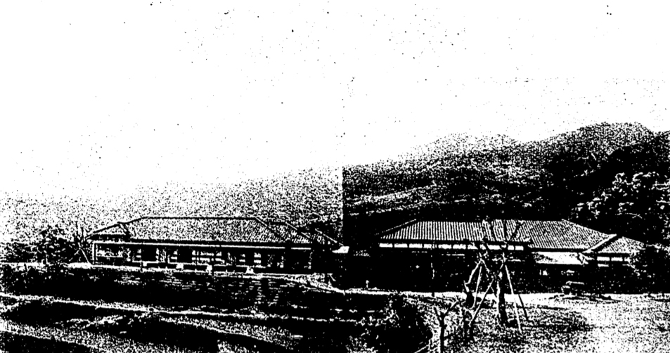 中文（台灣）: 新元記念館位於臺北州北投庄北投溫泉，是為了紀念曾任臺灣總督府鐵道部長的新元鹿之助